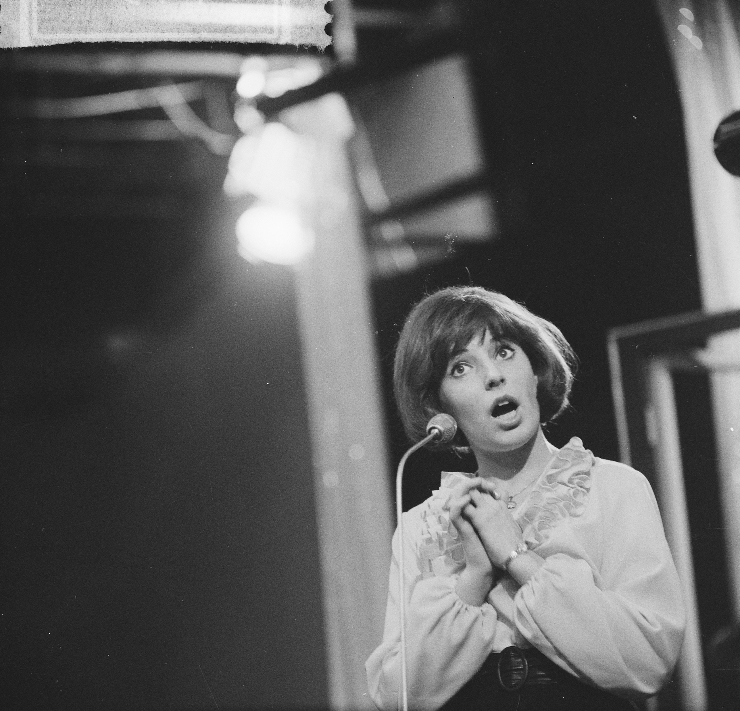 Collectie / Archief : Fotocollectie Anefo Reportage / Serie : Nationaal Songfestival 1965 Beschrijving : Finale Songfestival, Trea Dobbs Datum : 13 februari 1965 Trefwoorden : artiesten, muziek, songfestivals, zangeressen Persoonsnaam : Dobbs, Trea Instellingsnaam : Nationaal Songfestival Fotograaf : Nijs, Jac. de / Anefo Auteursrechthebbende : Nationaal Archief Materiaalsoort : Negatief (zwart/wit) Nummer archiefinventaris : bekijk toegang 2.24.01.03 Bestanddeelnummer : 917-4318